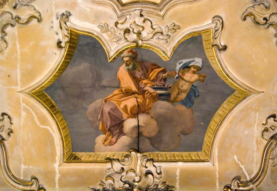 Winter.